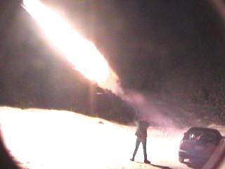 Nächtliche Vorführung der Flamethrowermunition